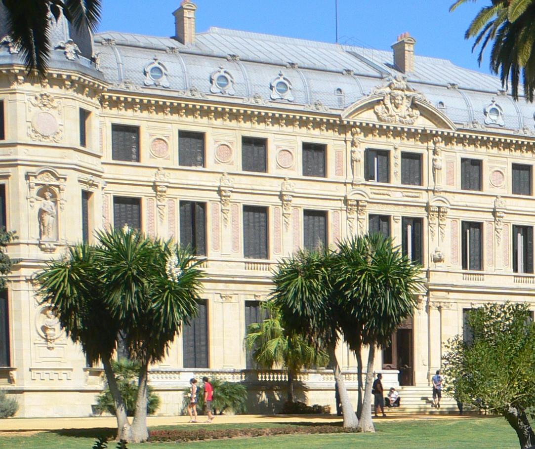 Palacio Duque de Abrantes, Jerez de la Frontera (Spain)